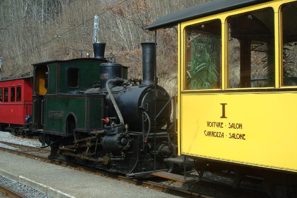 Selten am Tageslicht. Dampflokomotive G 3/3 1 Le Doubs der ehemaligen Chemin de fer Régional des Brenets (RdB), heute Transports Régionaux Neuchâtelois (TRN), bei der Museumsbahn Blonay-Chamby im Frühling 2010. Im Vordergrund Salonwagen As2 2 der Rhätischen Bahn (RhB), ehemals Berninabahn (BB). Im Hintergrund Personenwagen C2 7 der Nyon–St-Cergue–Morez-Bahn (NStCM).